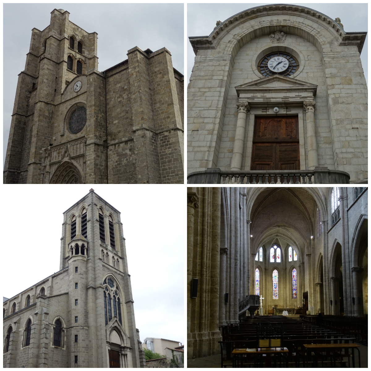 En haut à gauche à en bas à droite , Collégiale Notre-Dame d'Espérance , Palais de Justice , Église Saint-Pierre , Nef de la Collégiale Notre-Dame d'Espérance